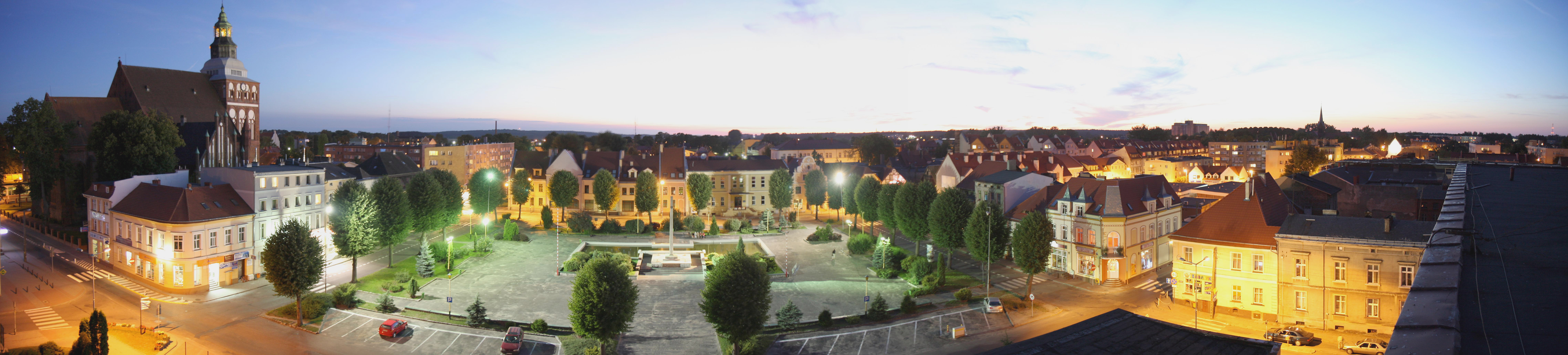 Wieczorna panorama placu Zwycięstwa w Gryficach, zachodniopomorskie